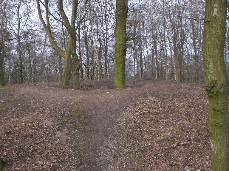 Erdwall der ehemaligen Pferdebergwarte auf dem Pferdeberg bei Duderstadt (Germany)